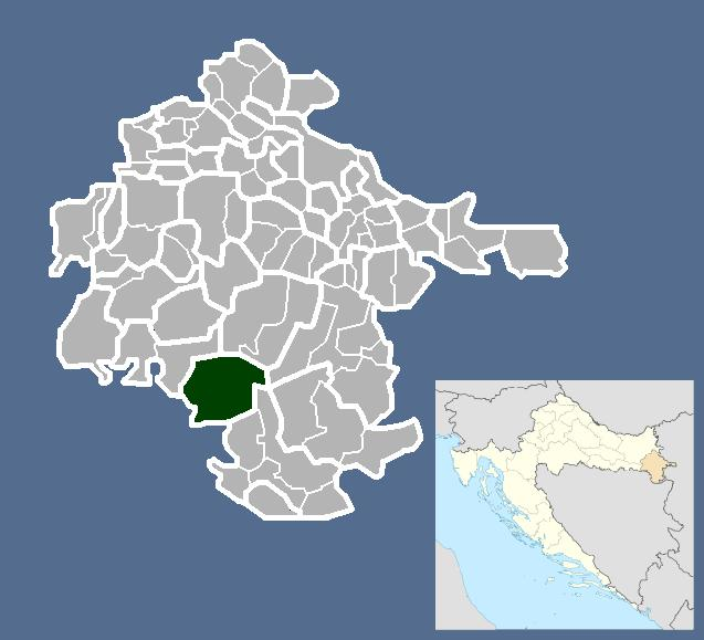 Српски (ћирилица): Општина Бошњаци.